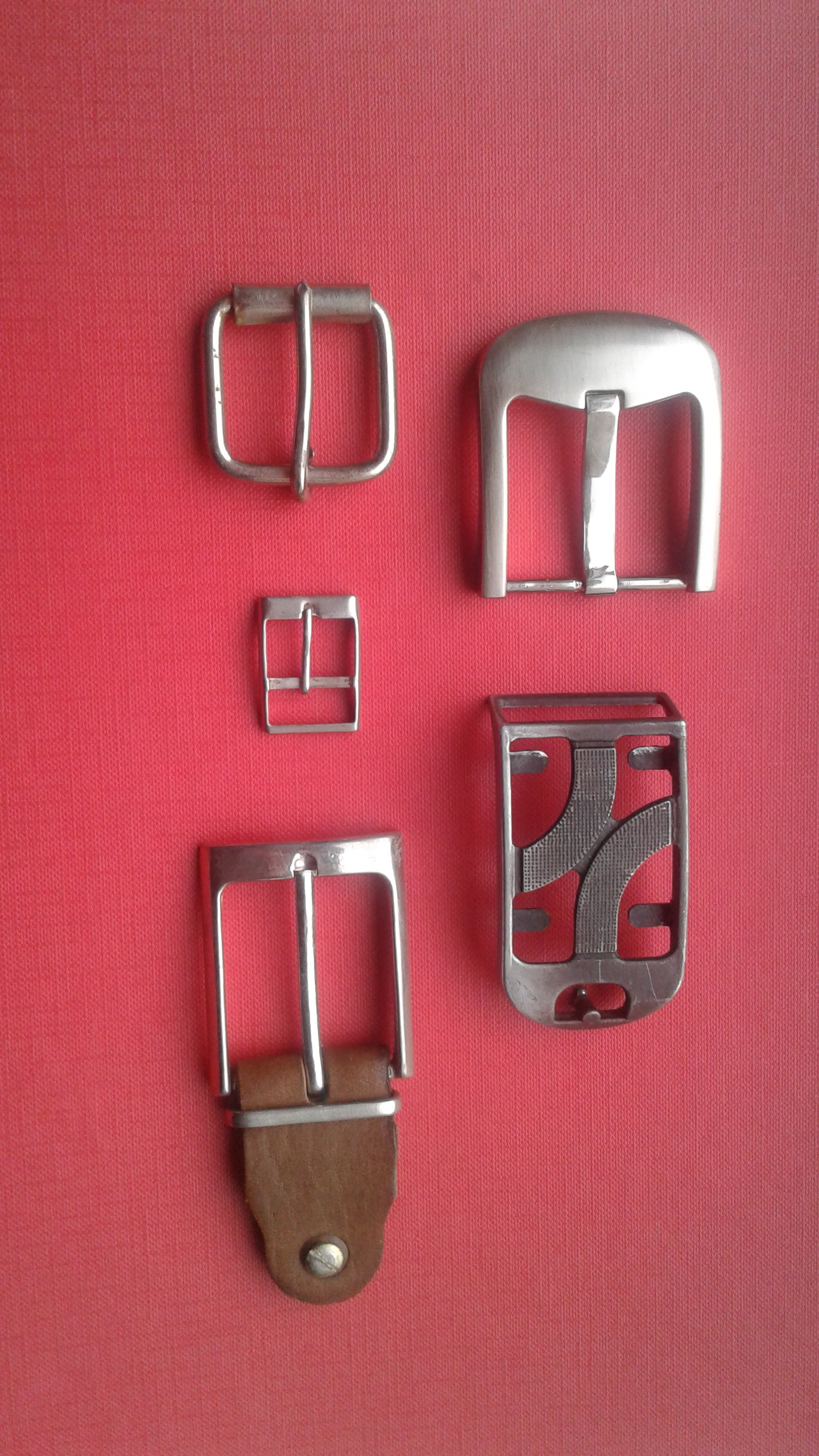 пряжки2